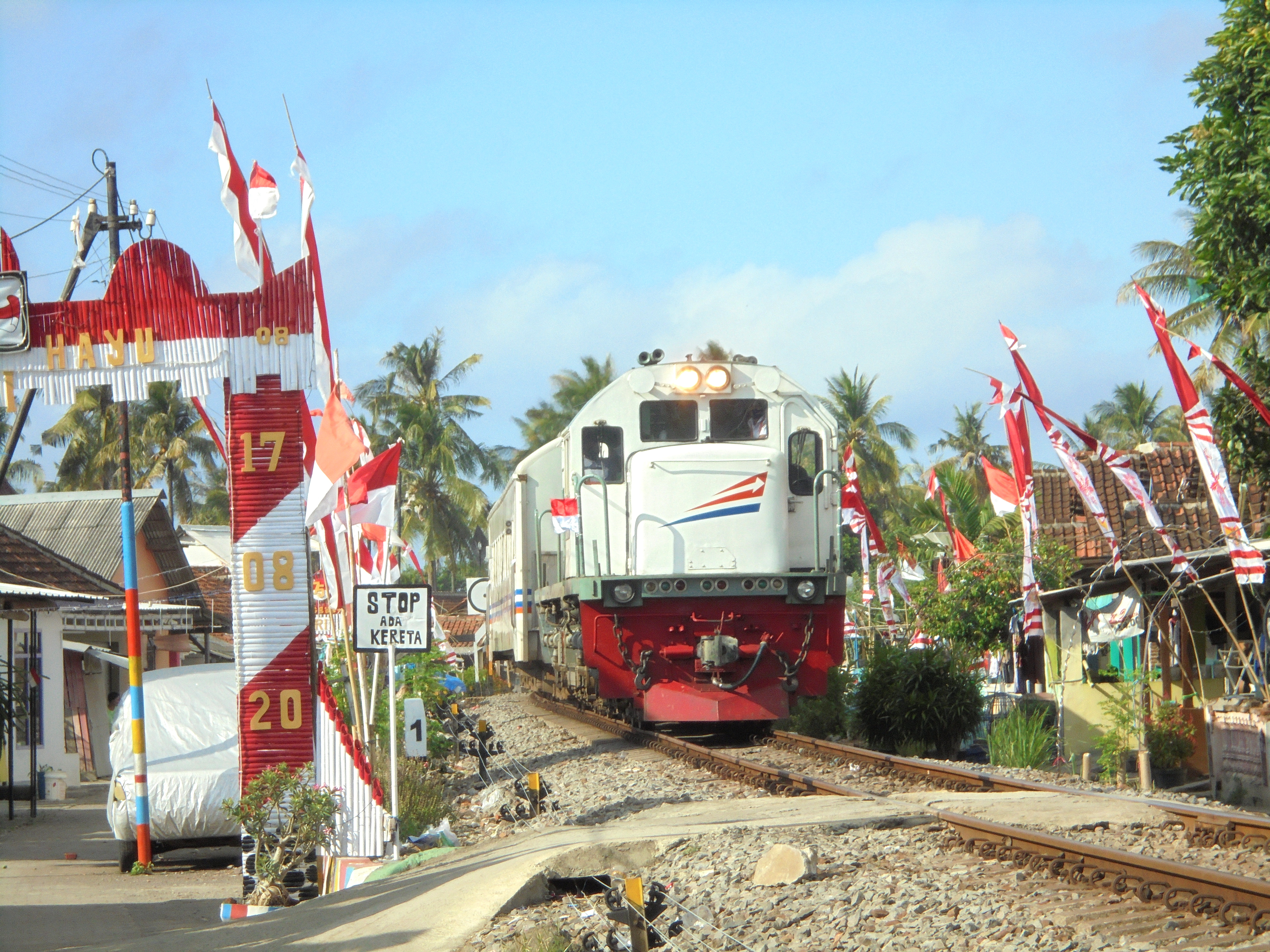 Kereta api Pandanwangi saat akan tiba di tujuan akhir, Stasiun Ketapang